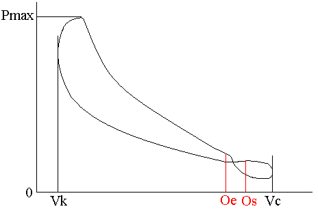 Two stroke engine diagram (real)